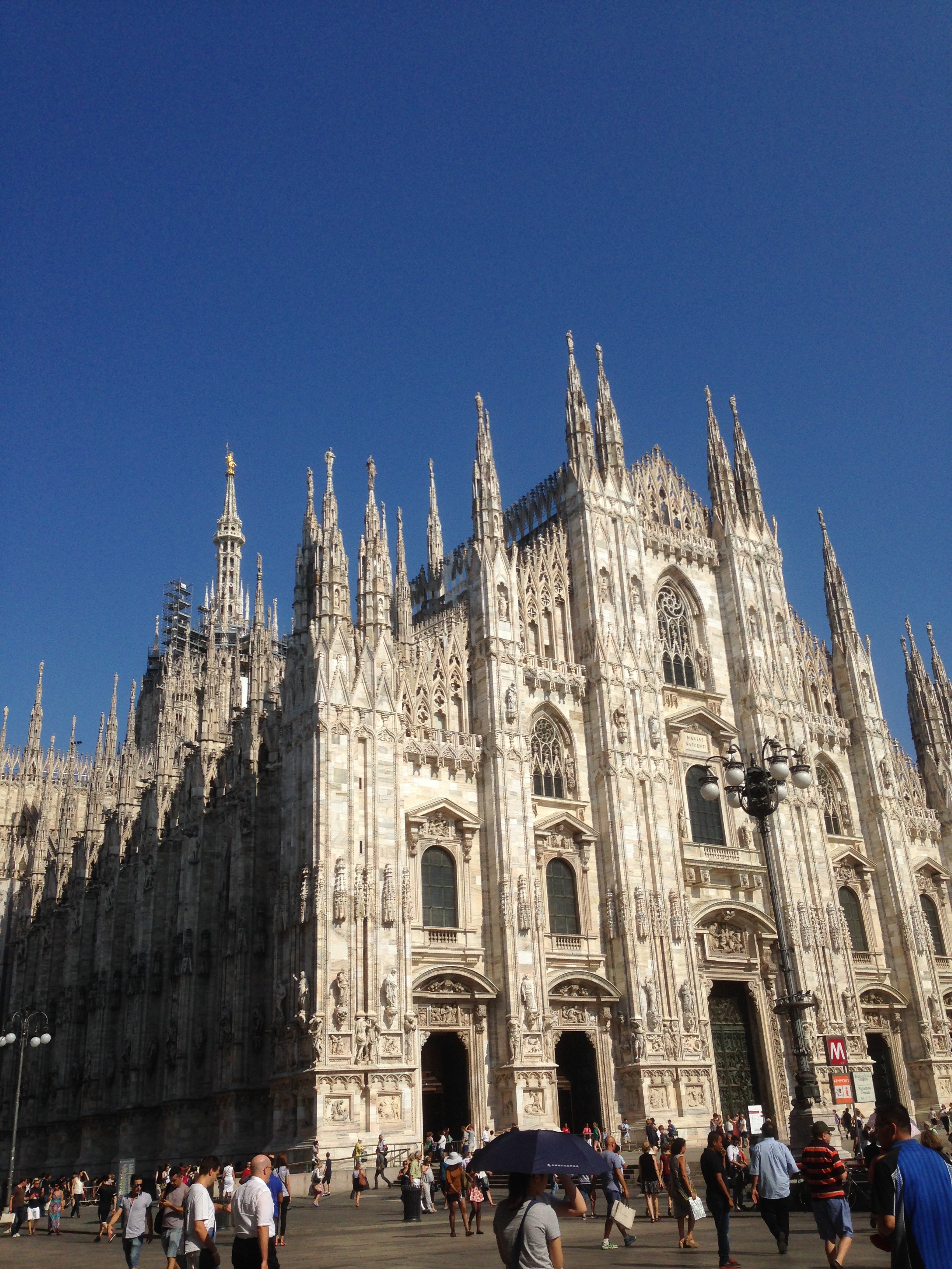 Katedral Milano adalah salah satu bangunan paling termasyhur di seluruh Eropa. Katedral (Duomo) ini sangat besar dan dibangun dengan arsitektur Gothik yang terletak di lapangan utama di pusat kota Milano, Italia. Duomo di Milano ini adalah katedral Katolik Roma kedua terbesar. Hanya Katedral Sevilla yang lebih besar (seperti halnya juga Basilika Santo Petrus di Roma, yang bukan berbentuk katedral). Gereja ini panjangnya 157 meter dan total 40.000 orang dapat ditampung di dalamnya dengan nyaman. Jendela-jendela yang besar dari bagian paduan suaranya terkenal sebagai yang terbesar di dunia